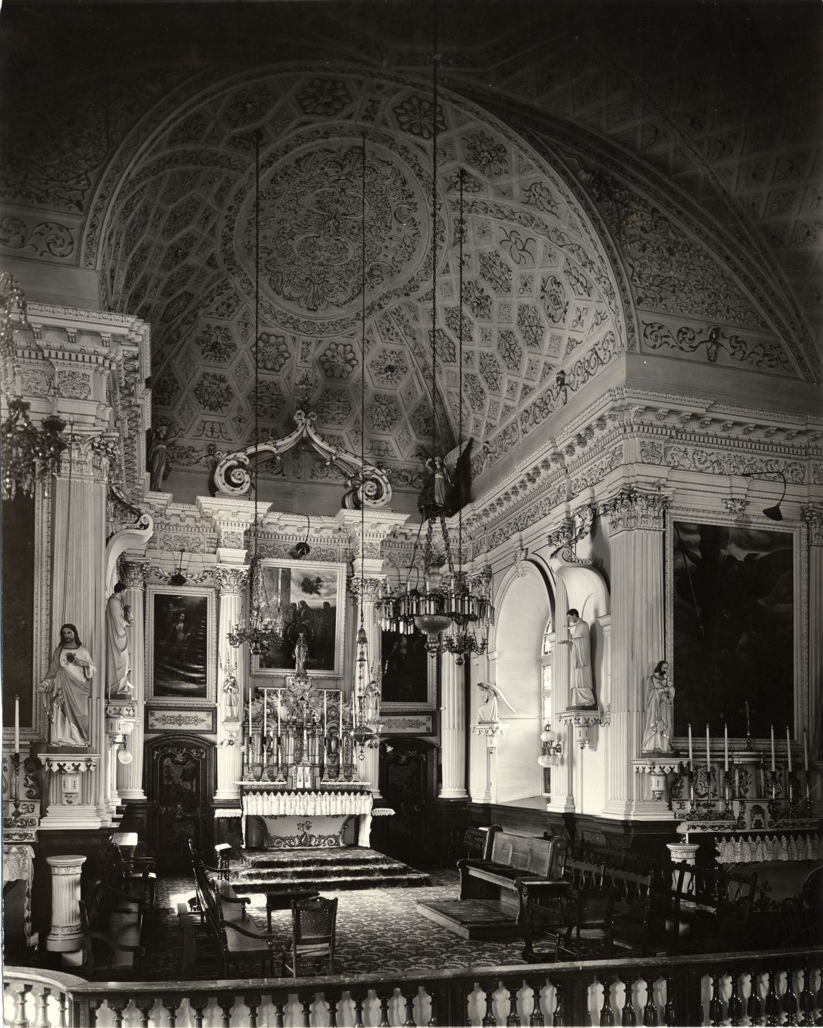 Église de la Visitation de la Bienheureuse-Vierge-Marie